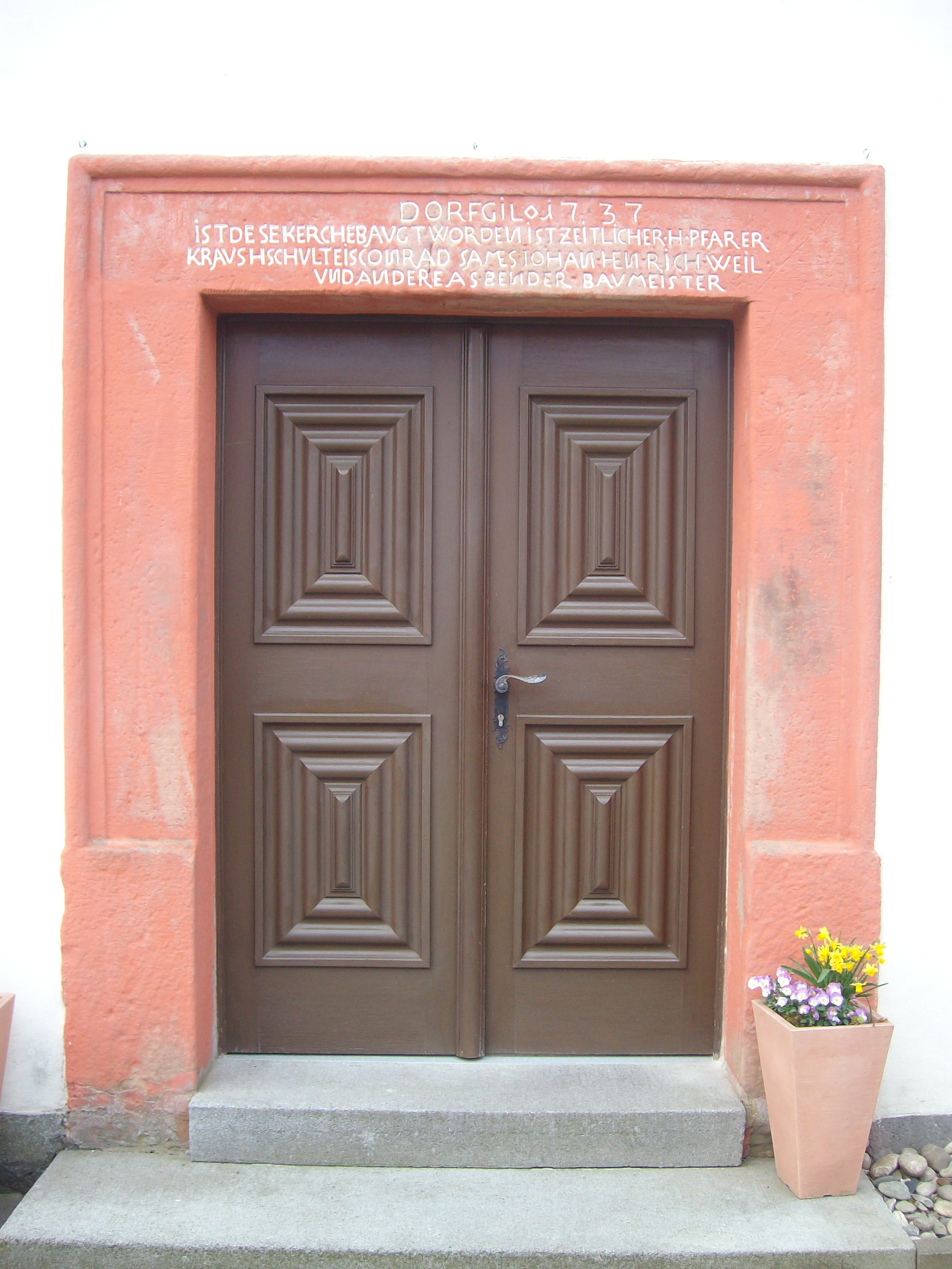 Portal der Kirche in Dorf Güll, Hessen